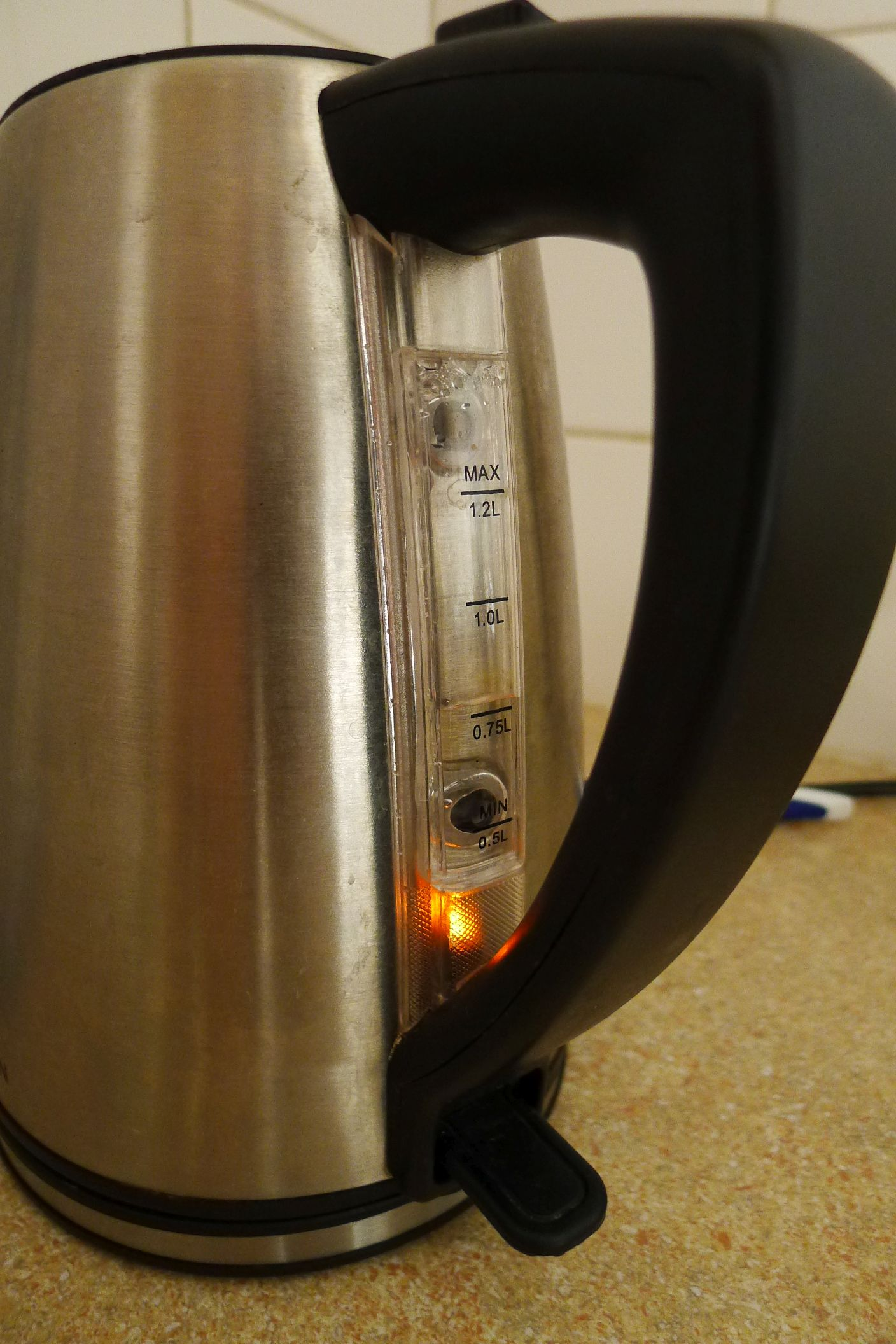 Het peilglas van een waterkoker is een concreet voorbeeld van communicerende vaten